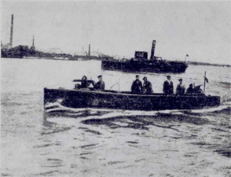 Motorówka uzbrojona, w głębi "Stefan Batory". Zdjęcie z 1920r